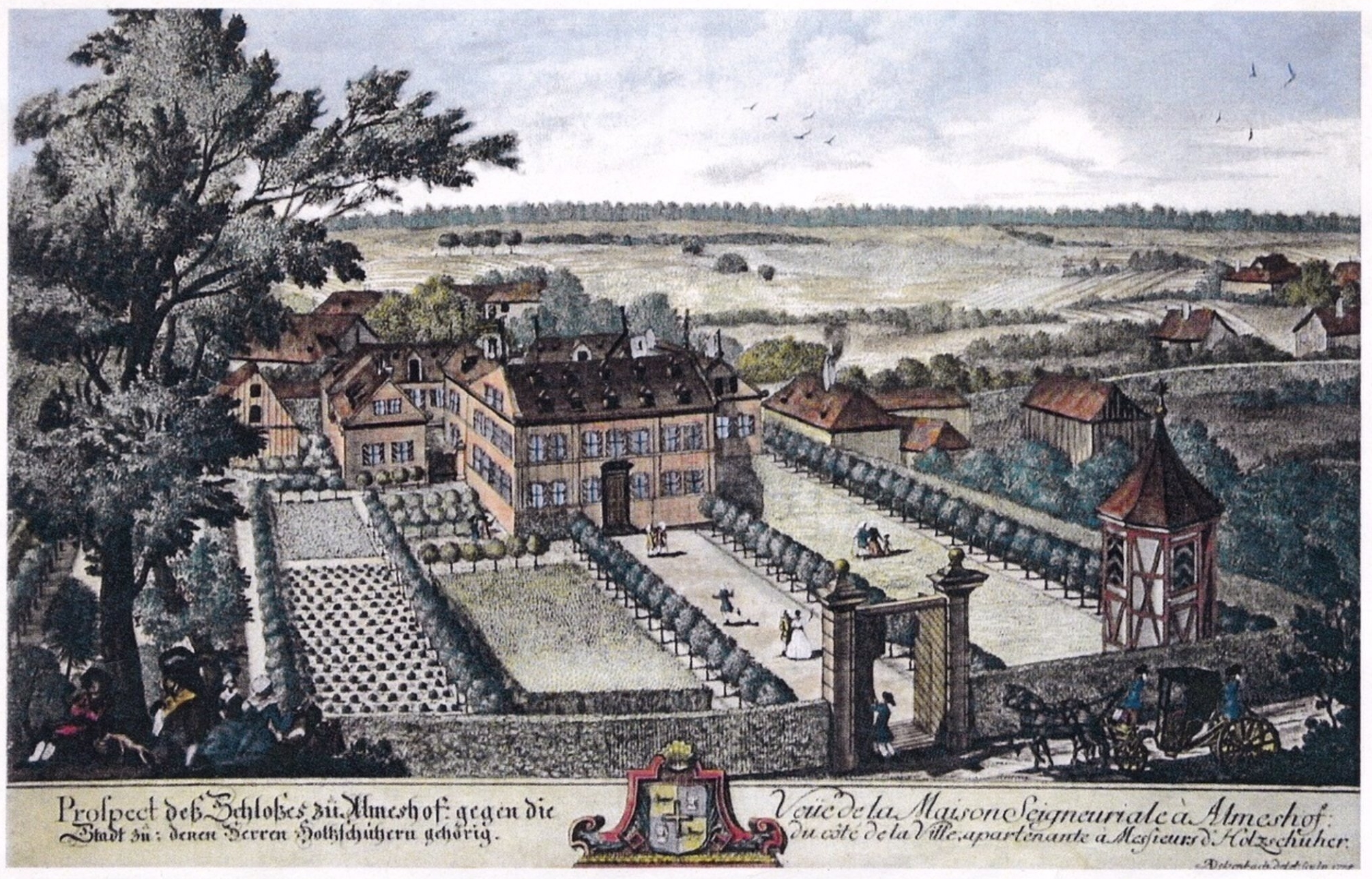 Kupferstich coloriert - Nürnberg - Schloss Almoshof